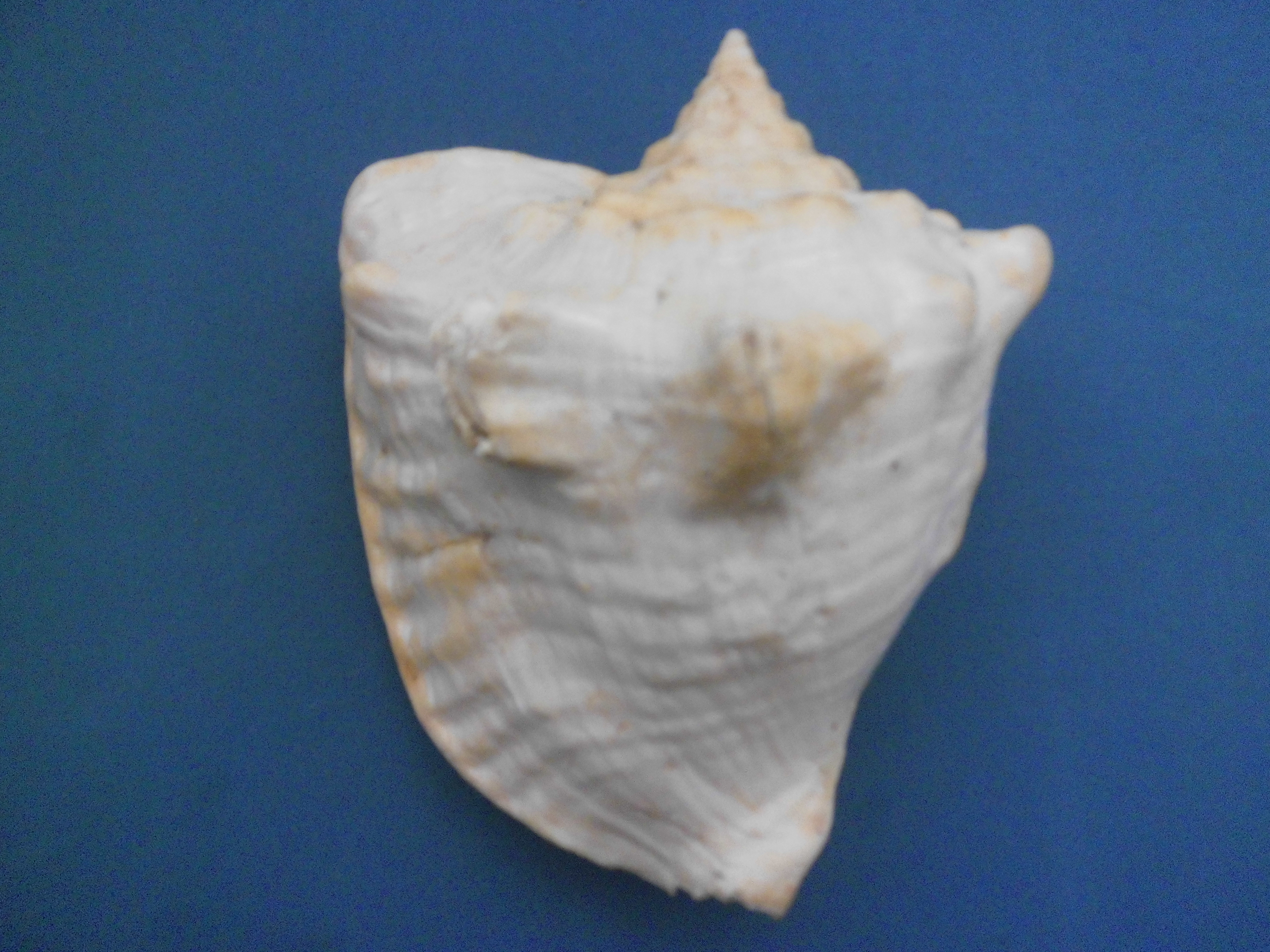 Lobatus costatus (Gmelin, 1791) colectado en el 2003 en Cayos las Tortuguillas - Isla La Tortuga, Dependencia Federales - Venezuela